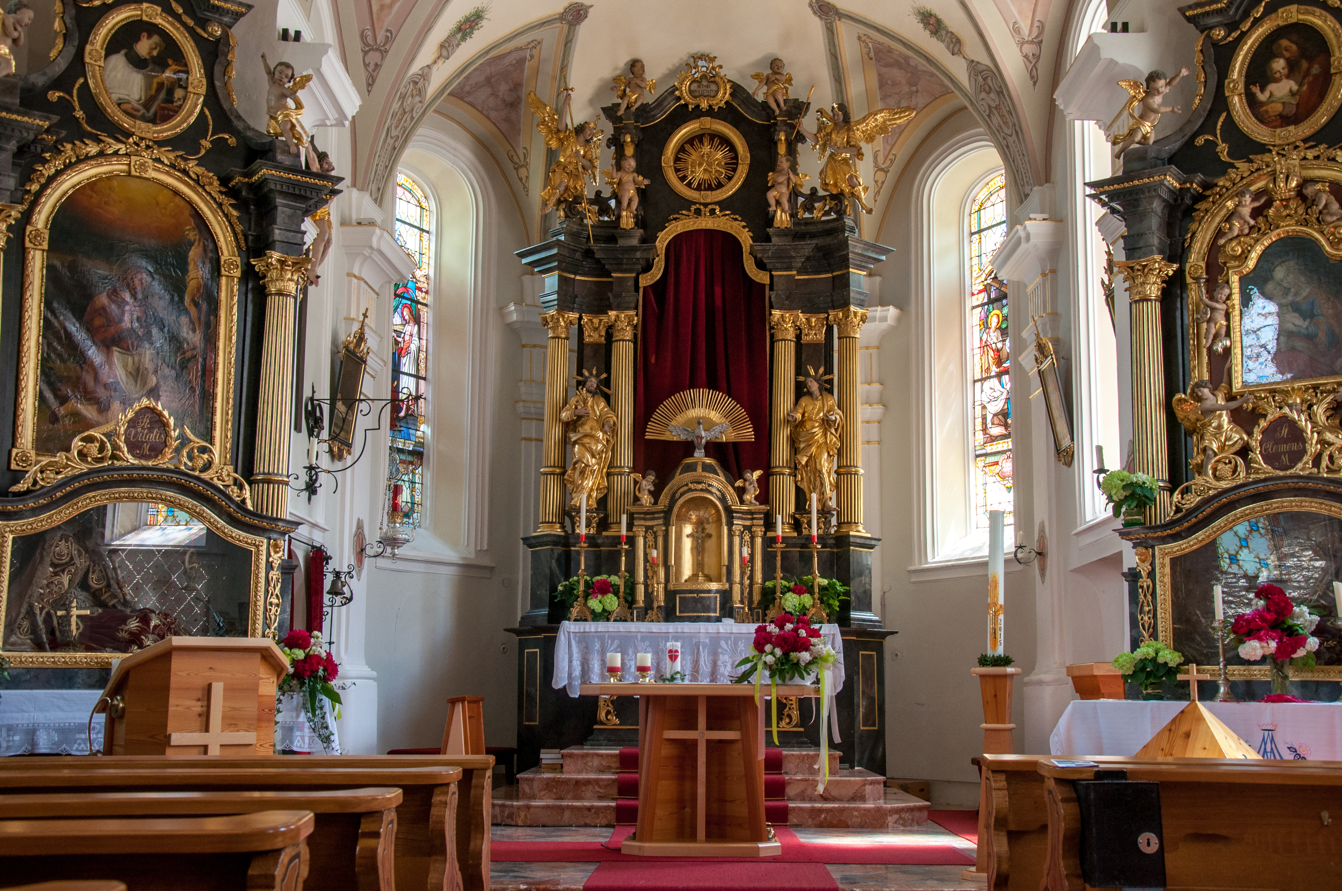 Kath. Pfarrkirche hl. Magnus